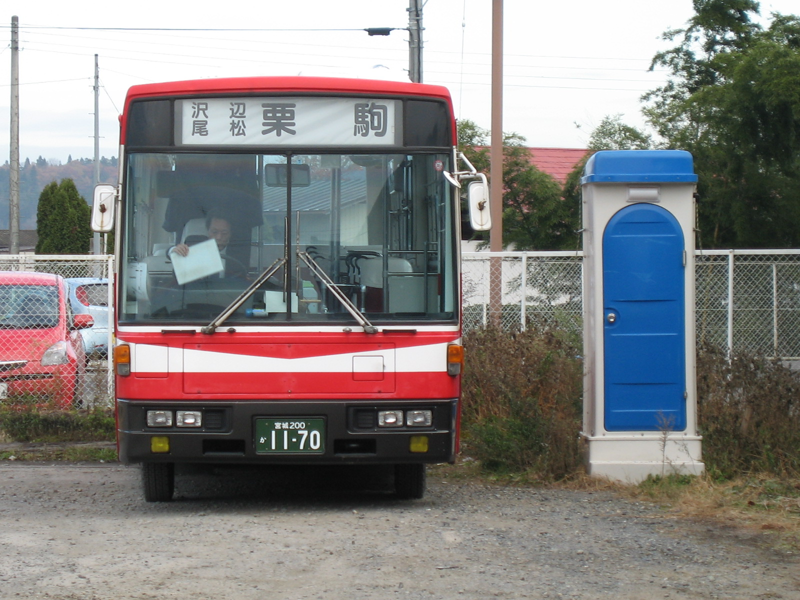 Miyagi Kotsu bus Kurihara den-en line 宮城交通 ミヤコーバス くりはら田園線